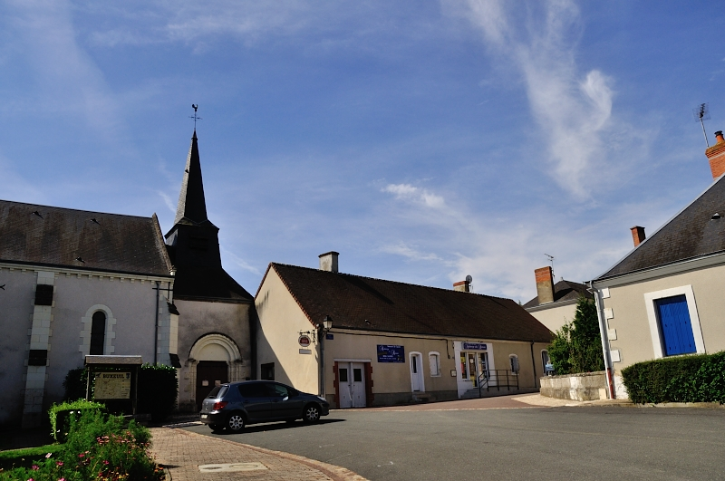 Place principale - Buxeuil (Indre)